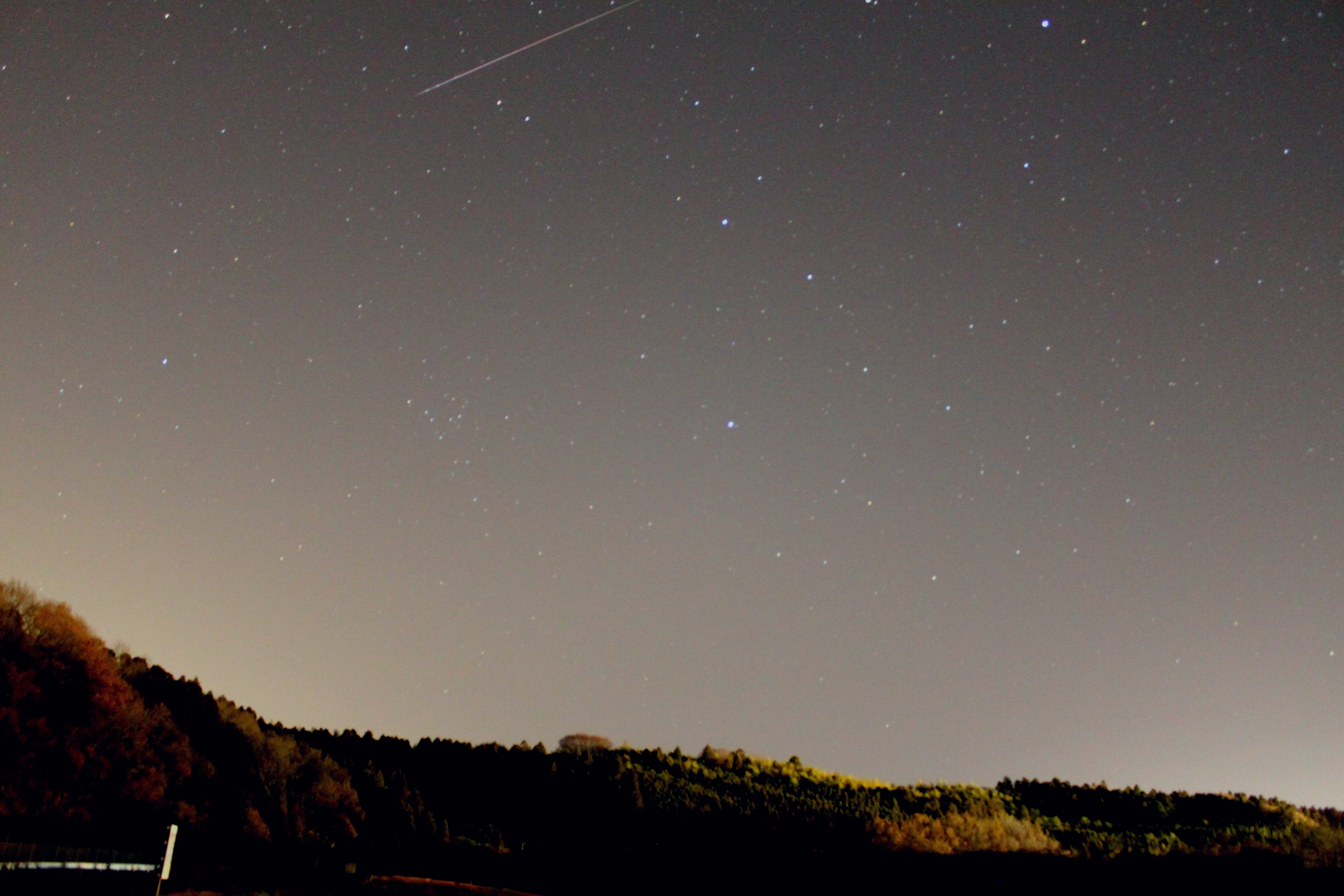 2010/12/14 長柄ダムから見た流れ星（獅子座流星群）